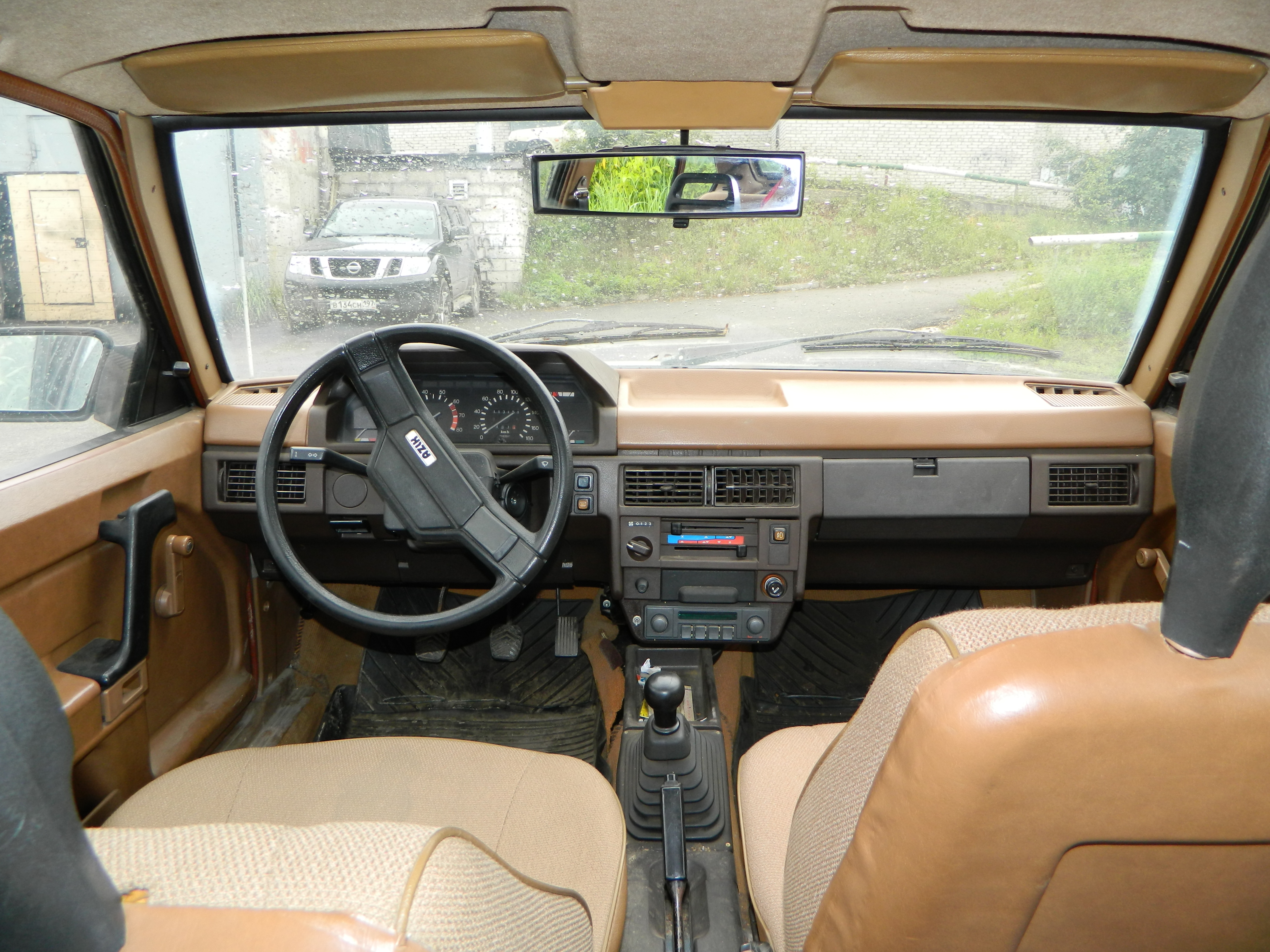 Коричневый салон автомобиля Москвич 2141 1989 года выпуска со вставленным лобовым стеклом. Коричневый салон устанавливался примерно до 1990 года.